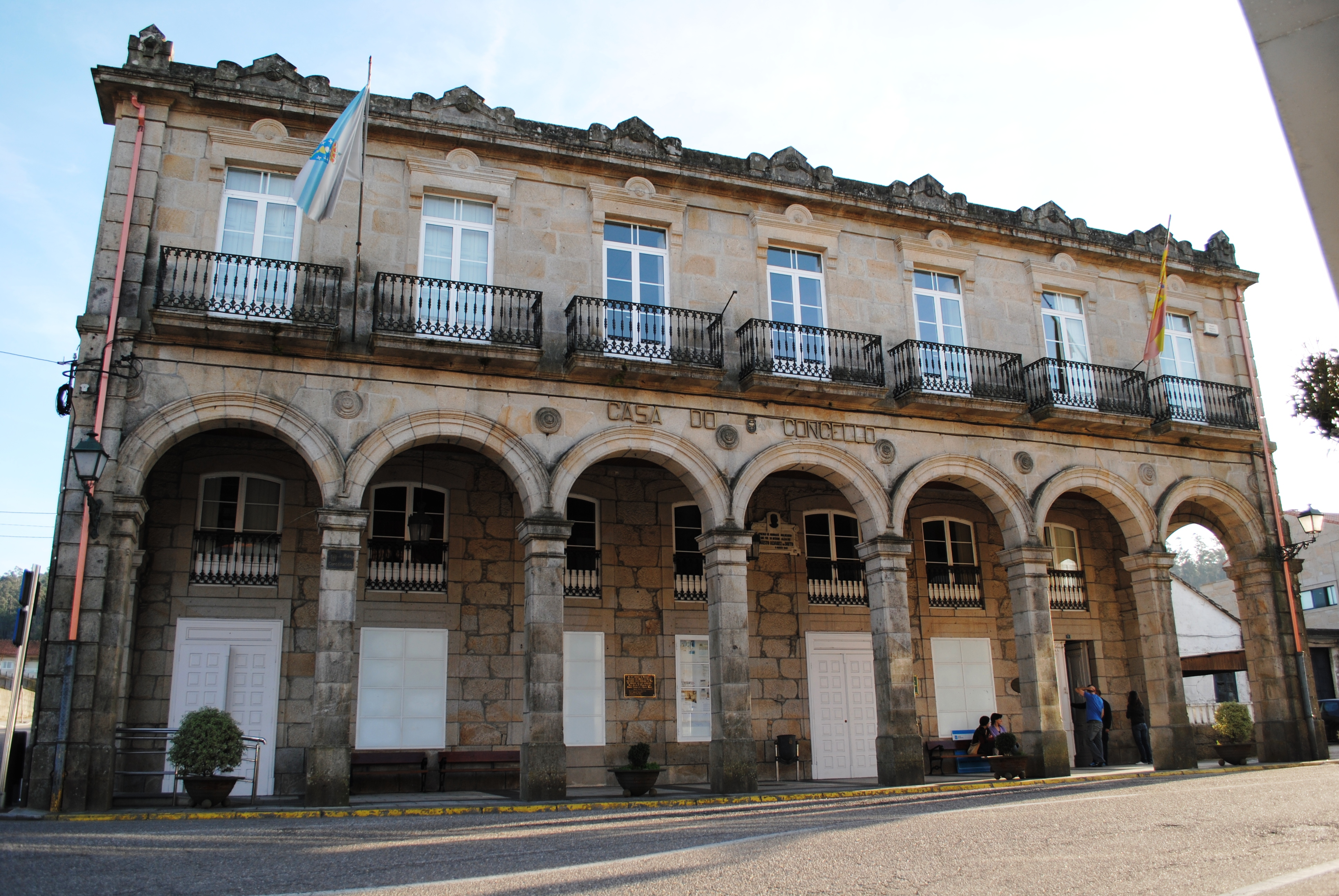 Casa do Concello de Mondariz-Balneario